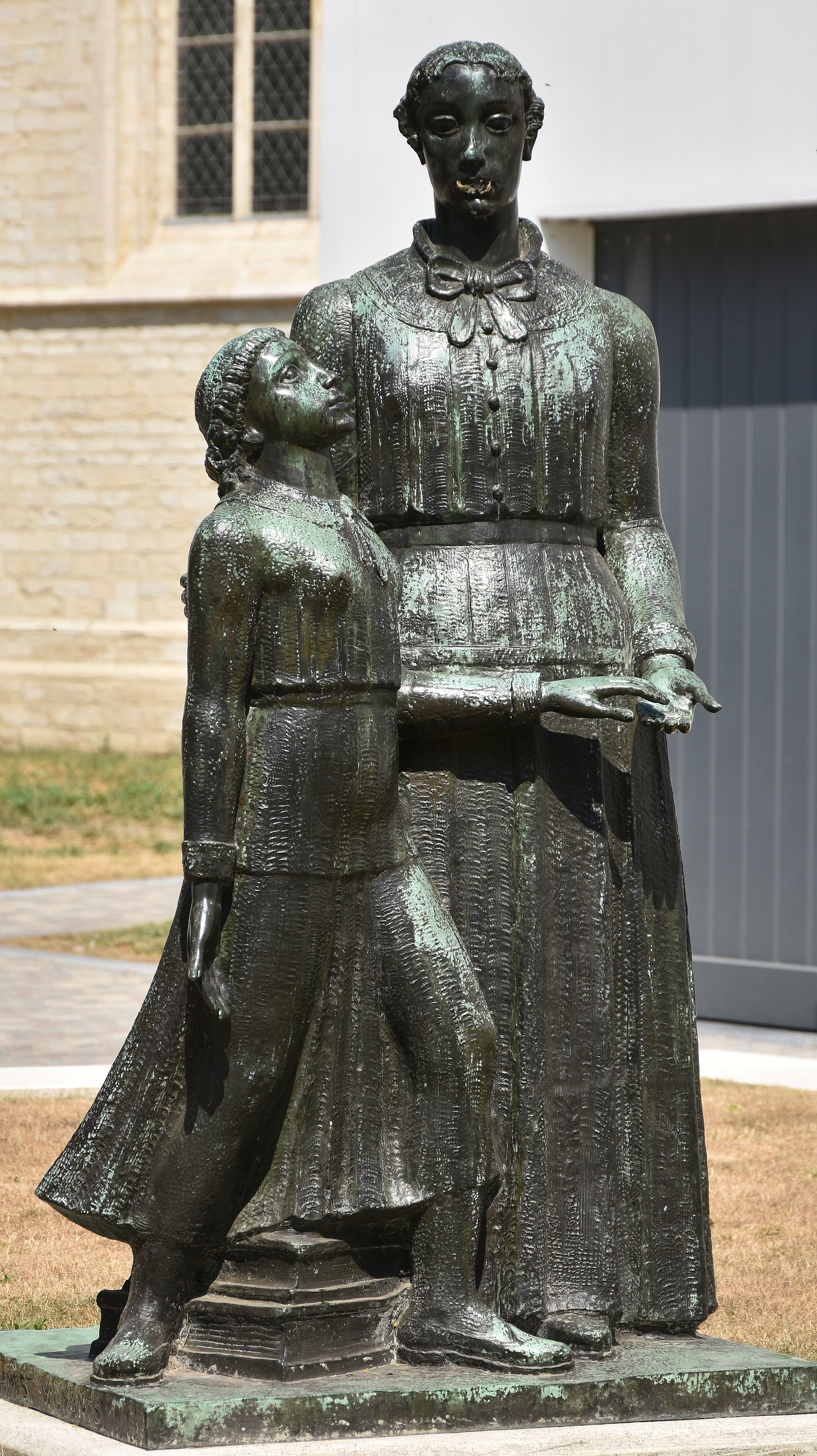 Ernest Wijnants (1878-1964) Moeder en kind (1952) - Sint-Janskerkhof Mechelen This photo of immovable heritage has been taken in the Flemish Region